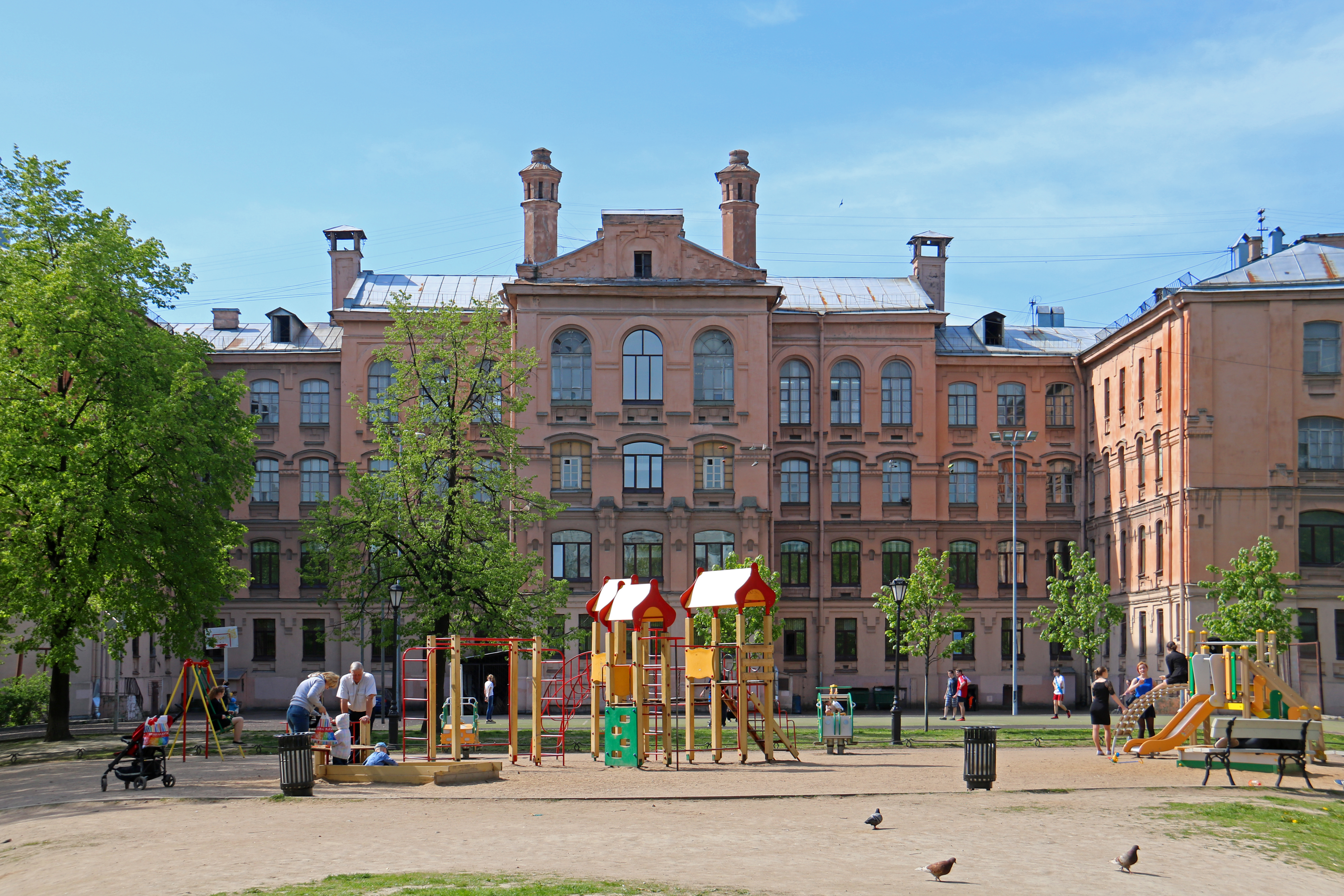 Греческий сад с территорией: Греческий проспект, 8, Прудковский переулок, 1-3, Центральный район, Санкт-Петербург